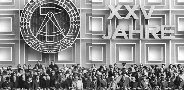 Berlin, 25. Jahrestag DDR-Gründung, Parade ADN-ZB Spremberg 7.10.74 Berlin: 25. Jahrestag-Ehrenparade der NVA - Blick auf die Ehrentribüne während der beeindruckenden einstündigen Ehrenparade der Nationalen Volksarmee am 7.10. in der Berliner Karl-Marx-Allee. 6.v.r. Erich Honecker, Erster Sekretär des ZK der SED, 7.v.r. Leorid I. Breschnew, Generalsekretär des ZK es KPdSU. (Näheres siehe ADN-Meldung) (zweiteiliges Panorama)